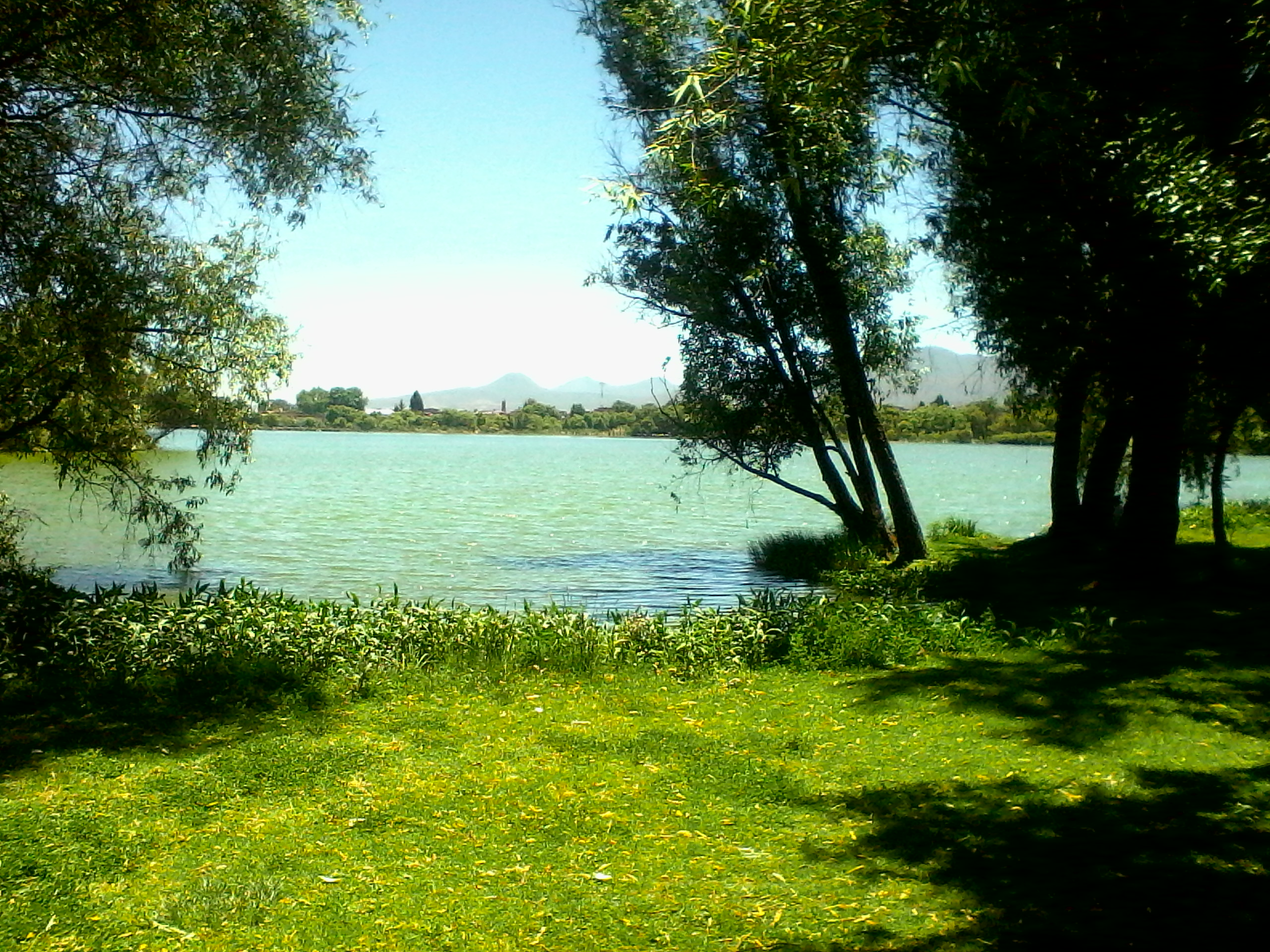 vista parcial de la Laguna de Zacapu